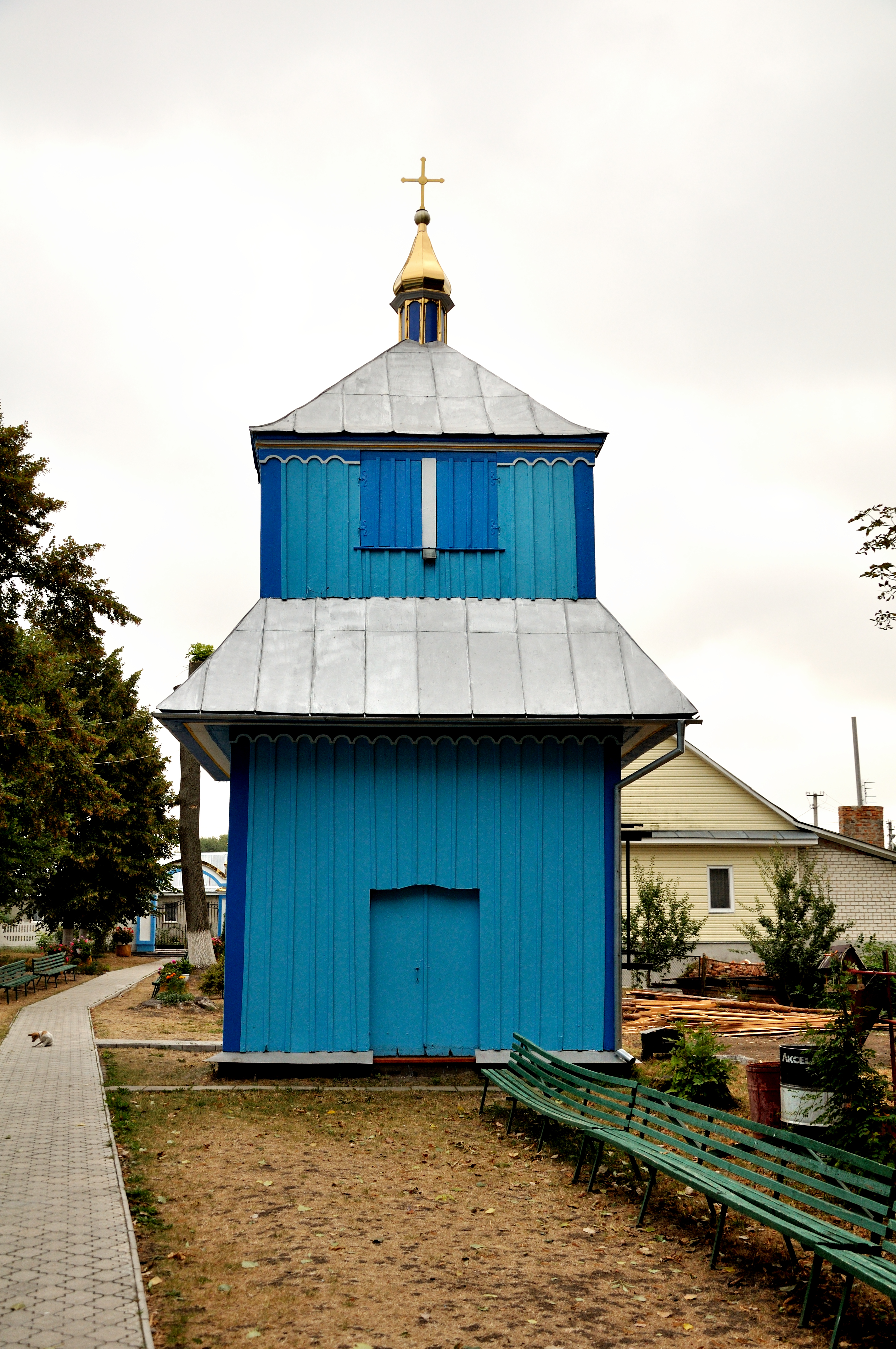 Дзвіниця Преображен-ської церкви (дер.), с.Тучин